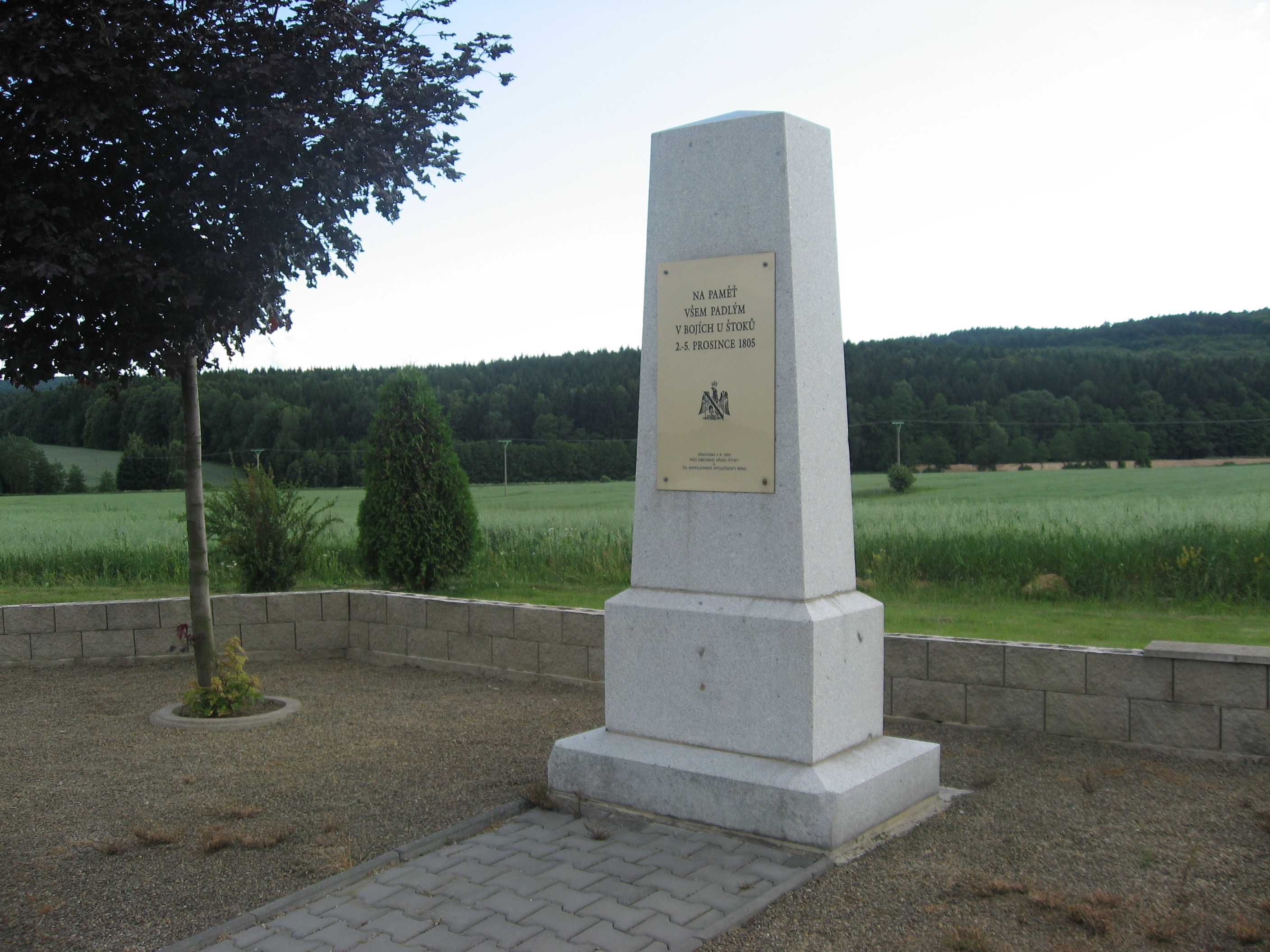 Štoky, památník obětem bojů z dob napoleonských válek